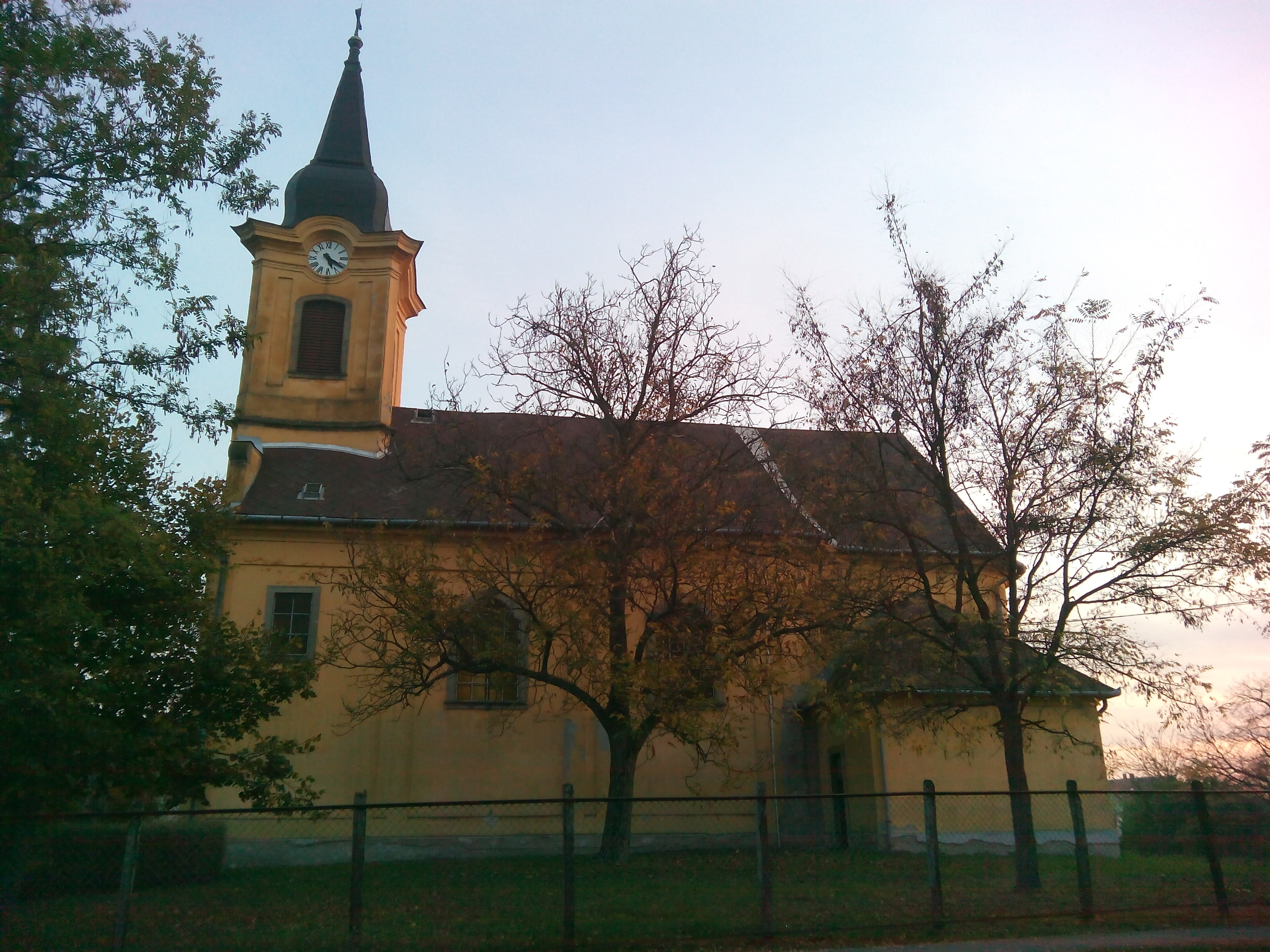 Dormánd katolikus templom